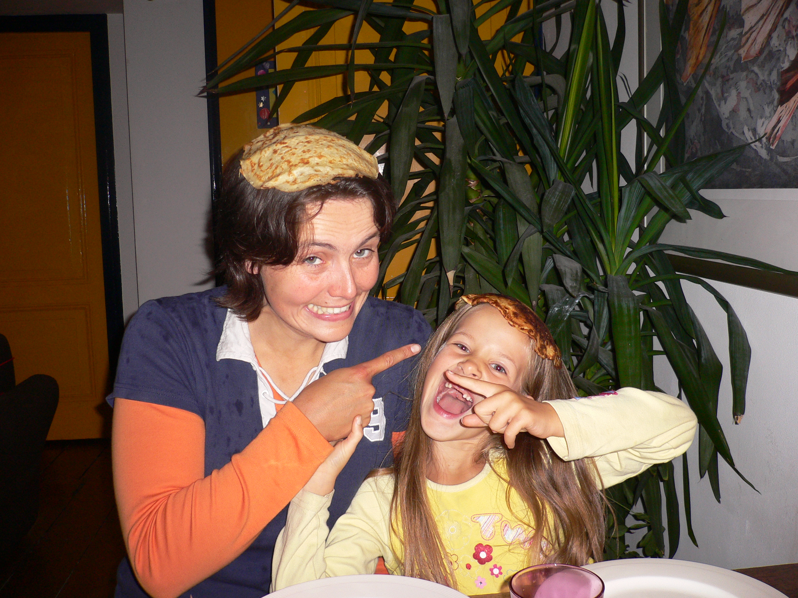 Lucia en Franka vieren Sint Pannenkoek